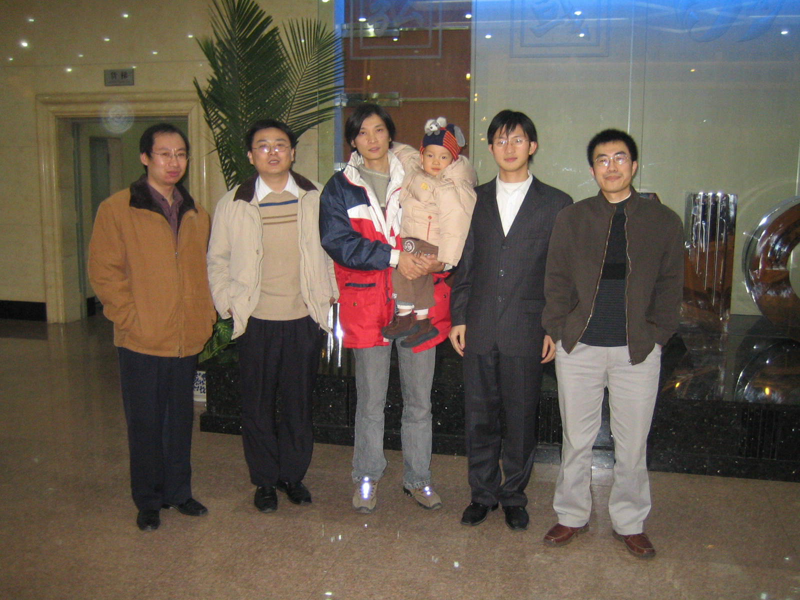 2004年12月北京维基人聚会